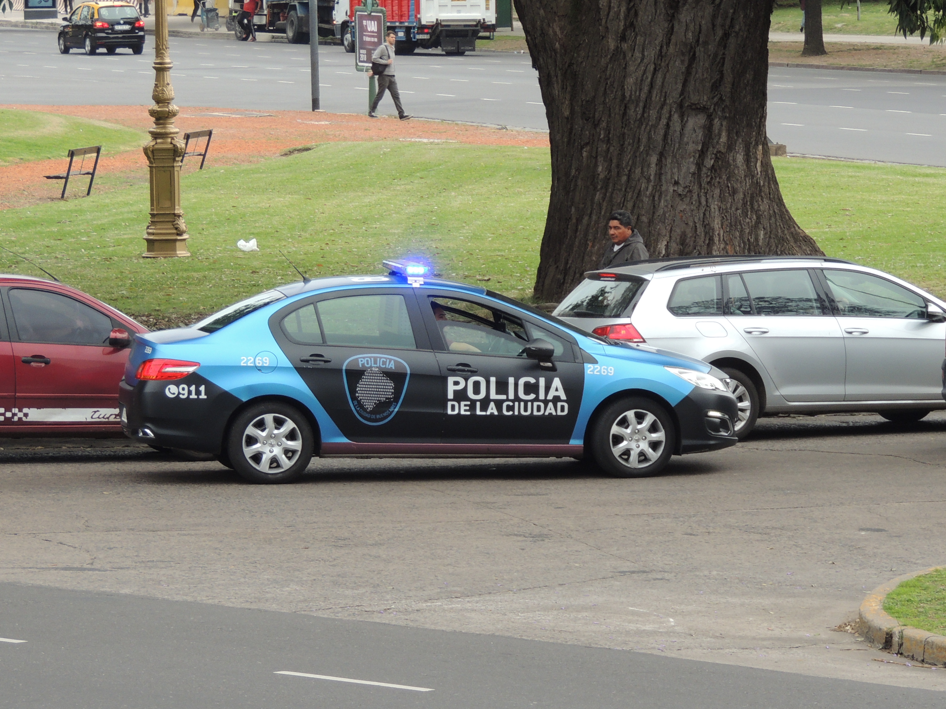 Patrullero de la Policía de la Ciudad de Buenos Aires por el barrio de Recoleta